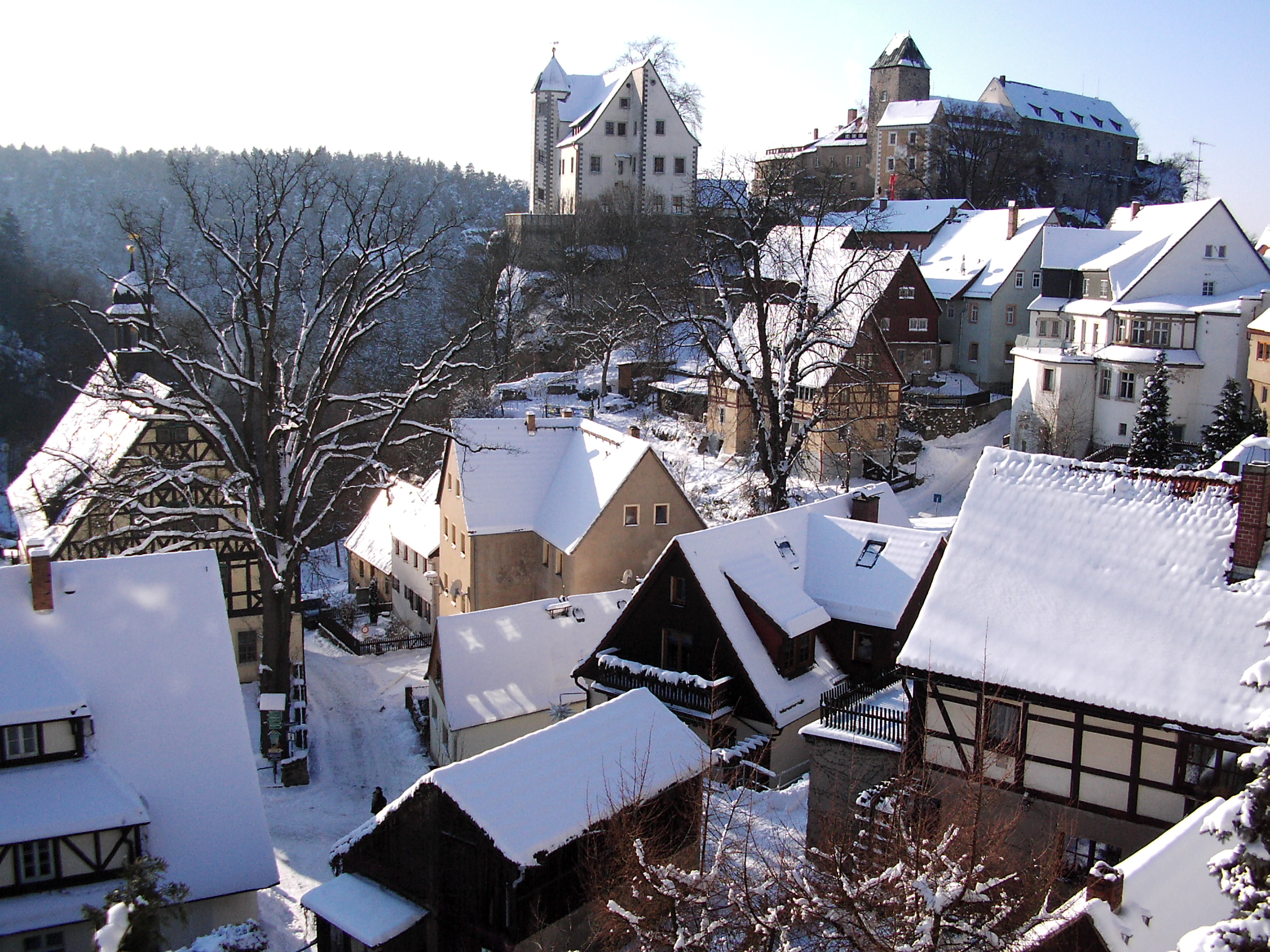 Hohnstein (Sächsische Schweiz) und Blick zur Burg - Denkmalschutzgebiet Hohnstein.